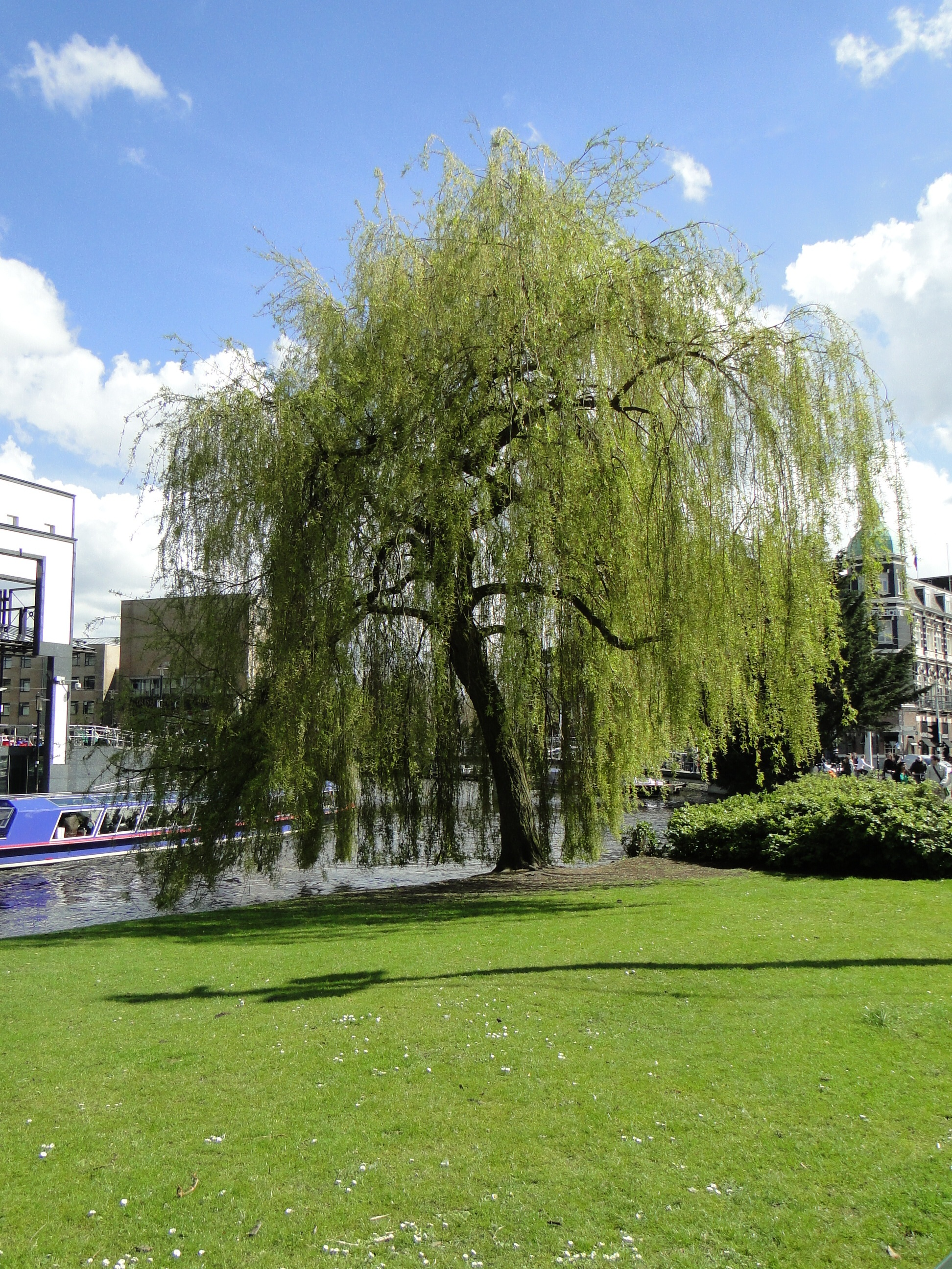 Amsterdam 11.04.2011